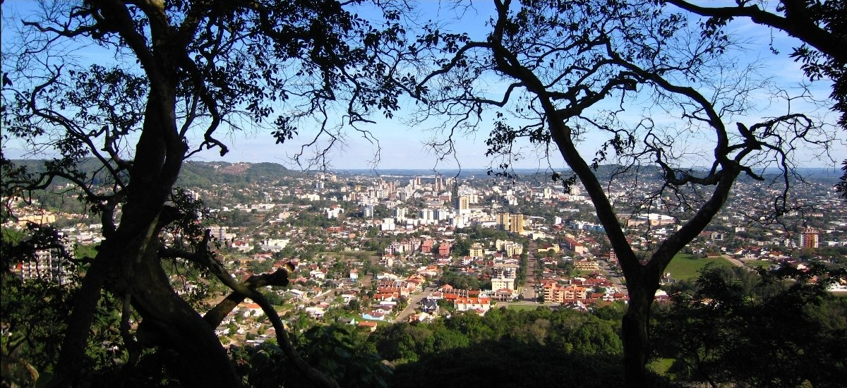 Description: Santa Cruz do Sul Author: Maurício E. Dick